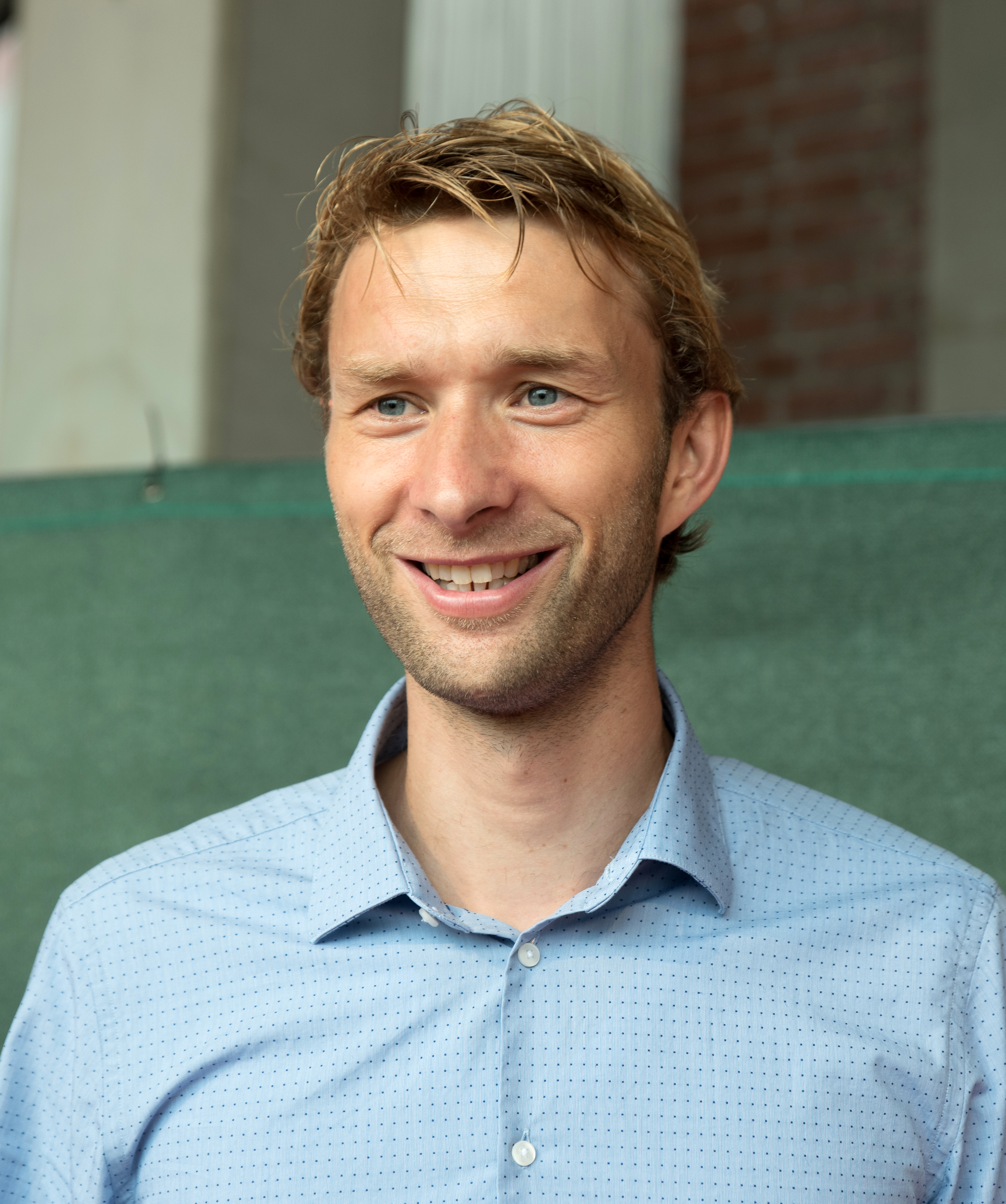 Simon Rolfes beim Tag der Legenden 2016